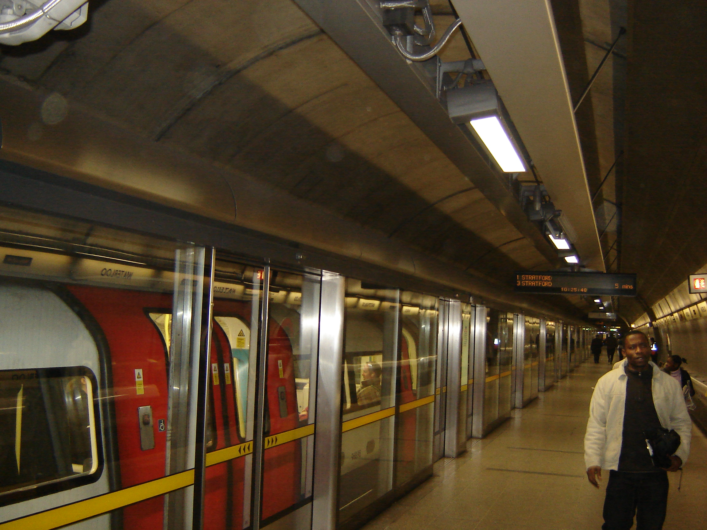 Metro u Londonu.